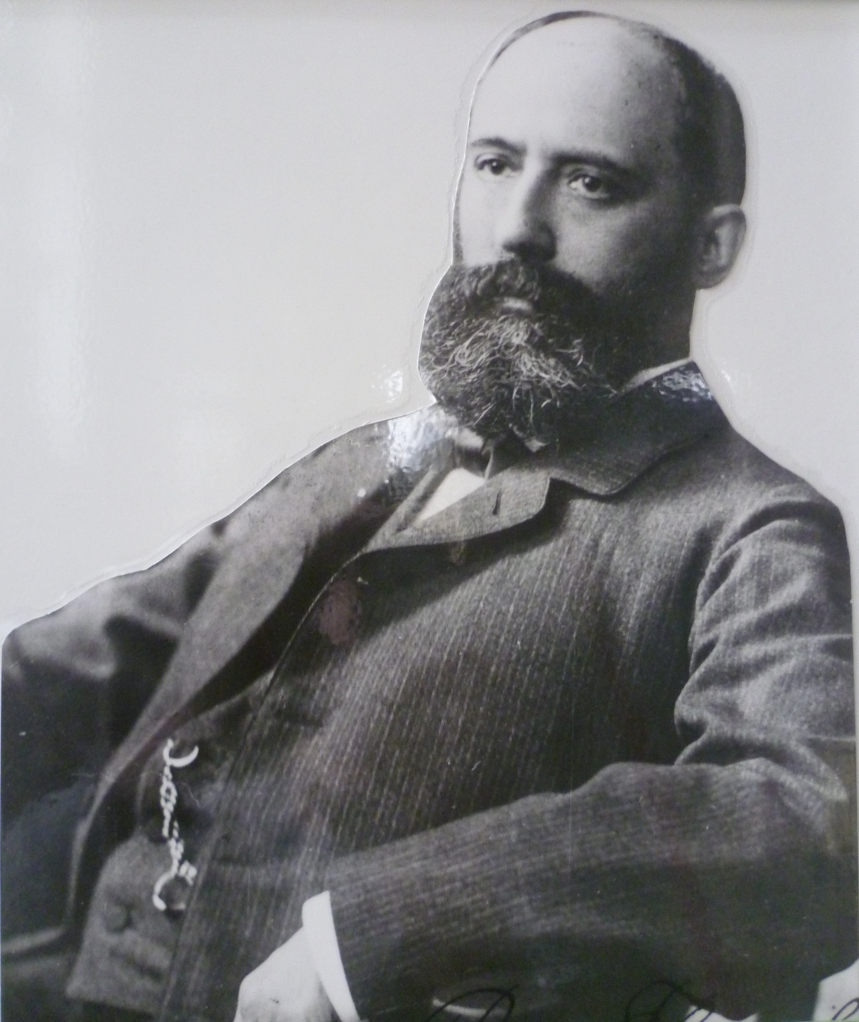 Fotografiert in der Ausstellung des Kalmenhof